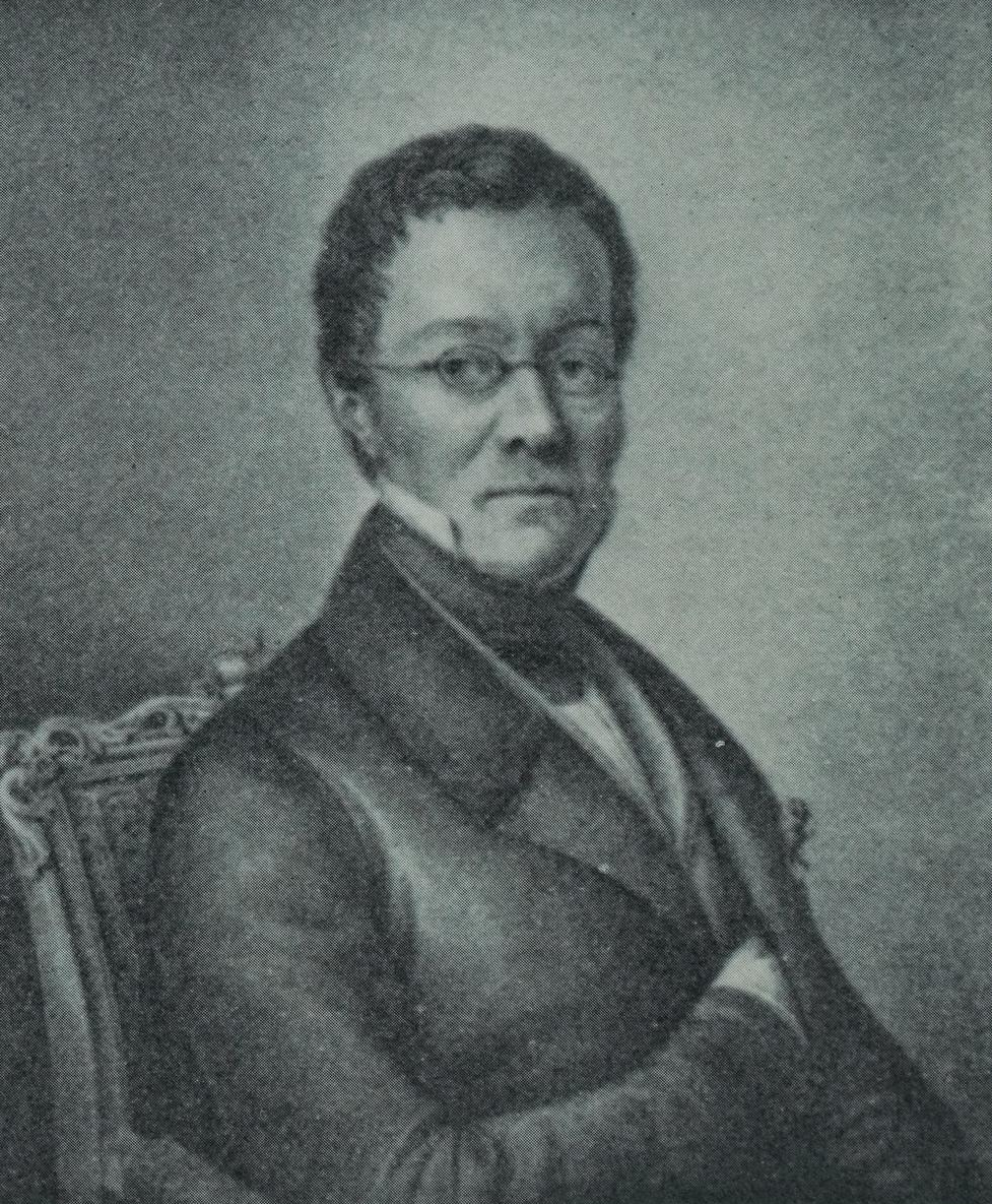 Sujet : Joseph de Salm-Reifferscheid-Dyck (1773-1861)